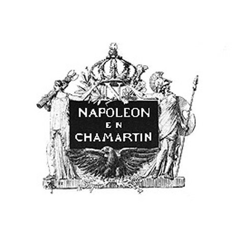 Ilustración de la novela "Napoleón en Chamartín" de Benito Pérez Galdós. Ilustraciones de Mélida y Lizcano, edición La Guirnalda y Episodios Nacionales, 1882.